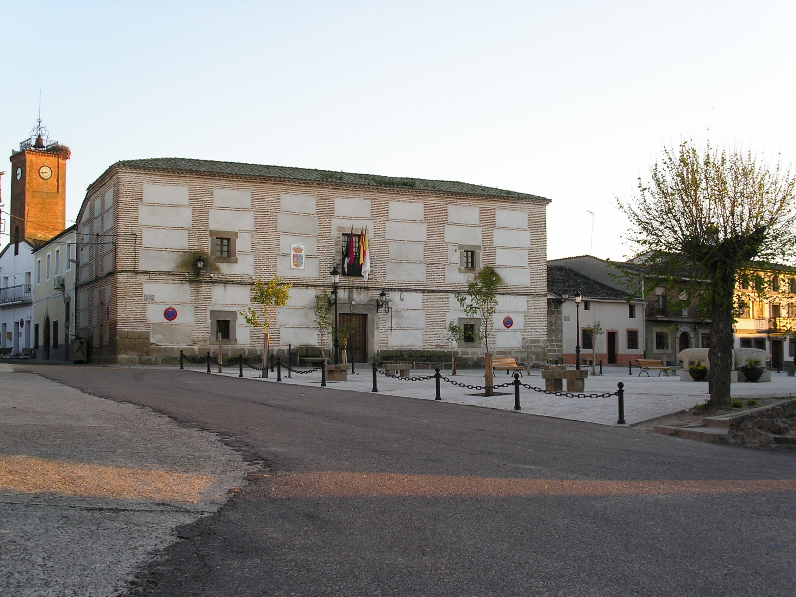 Fachada del Antiguo Hospital de Nuestra Señora de la Asunción, hoy Ayuntamiento de Torralba de Oropesa